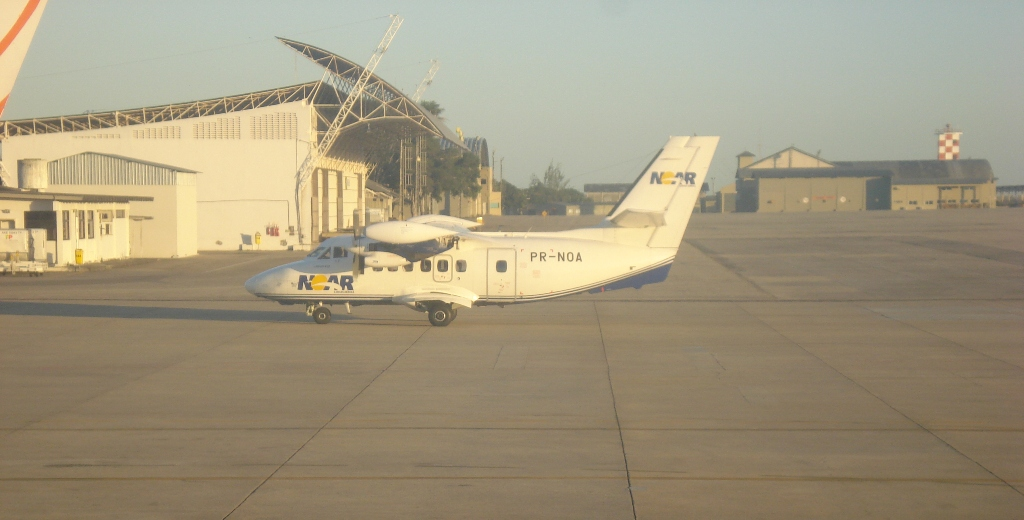 Avião da NOAR no pátio do Aeroporto Internacional Augusto Severo, em Natal, Brasil.